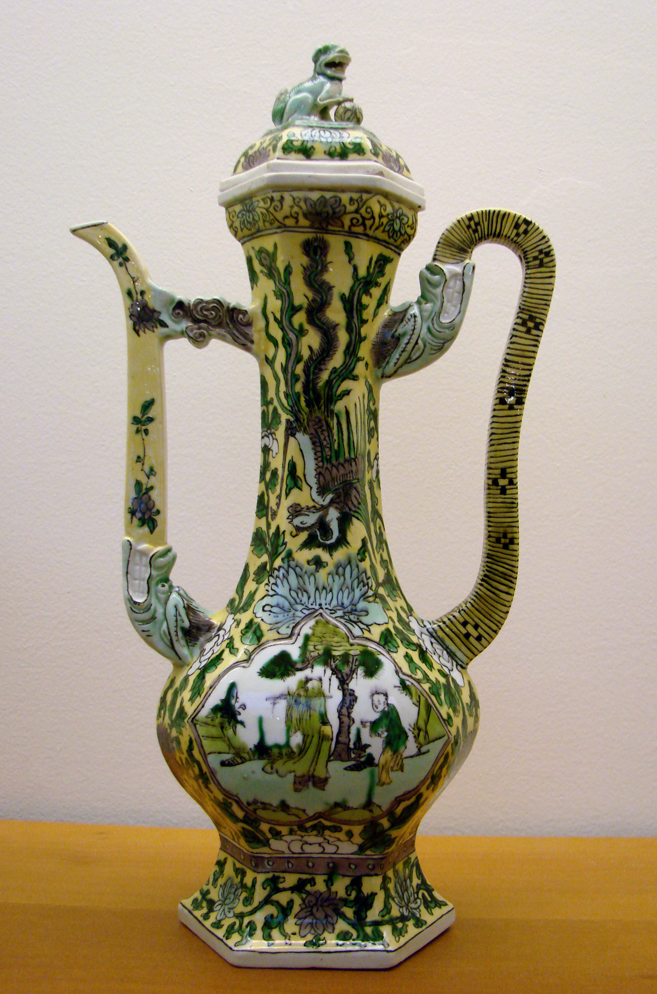 Aiguière. Dynastie Qing, période Kangxi (1662-1722), 17ème siècle. Musée Guimet, Paris.